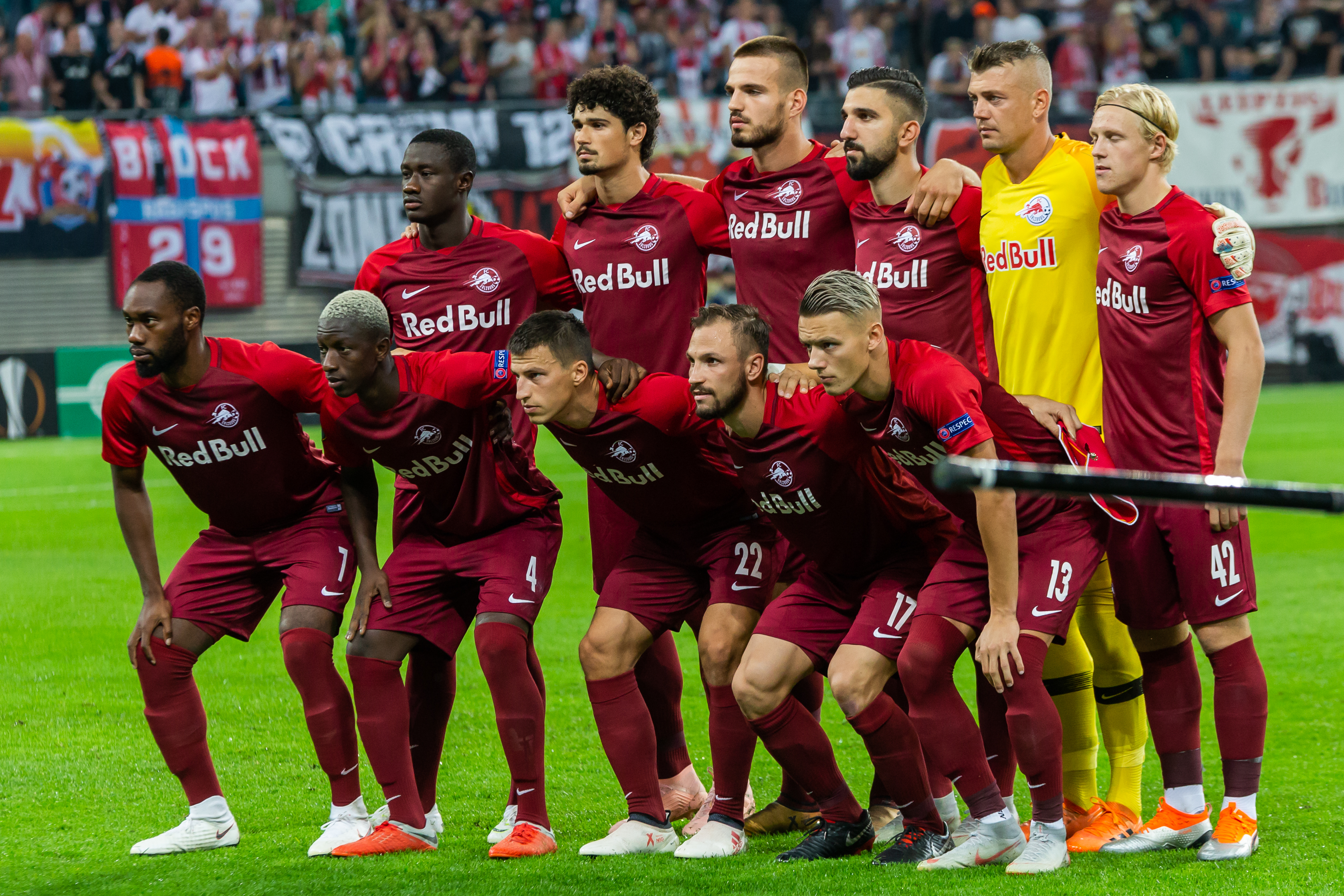 Mannschaftsfoto, Aufstellung, team photo FC Red Bull Salzburg